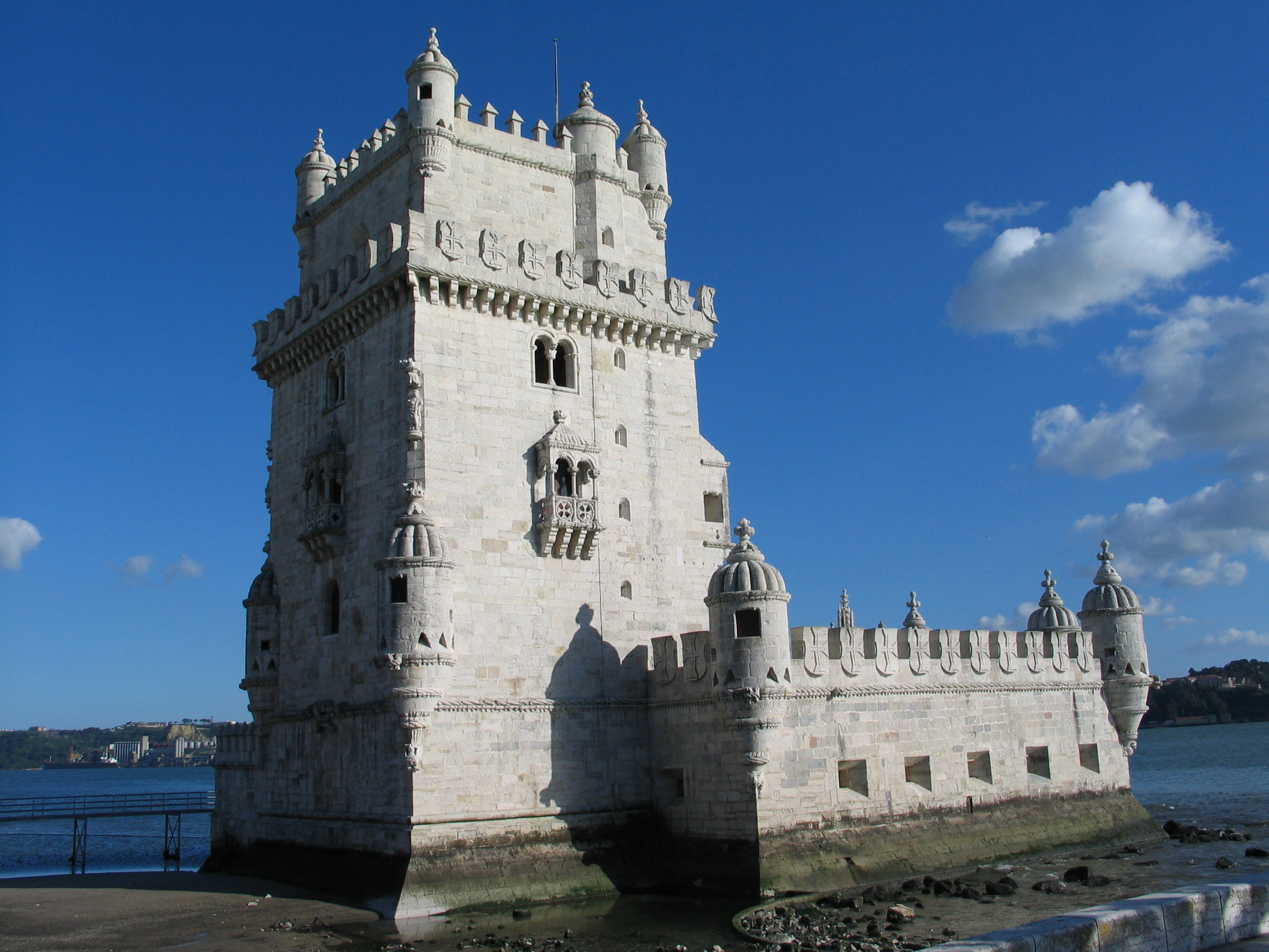 Torre de Belém em Lisboa, em Portugal. Torre de Belém, in Lisbon, Portugal.